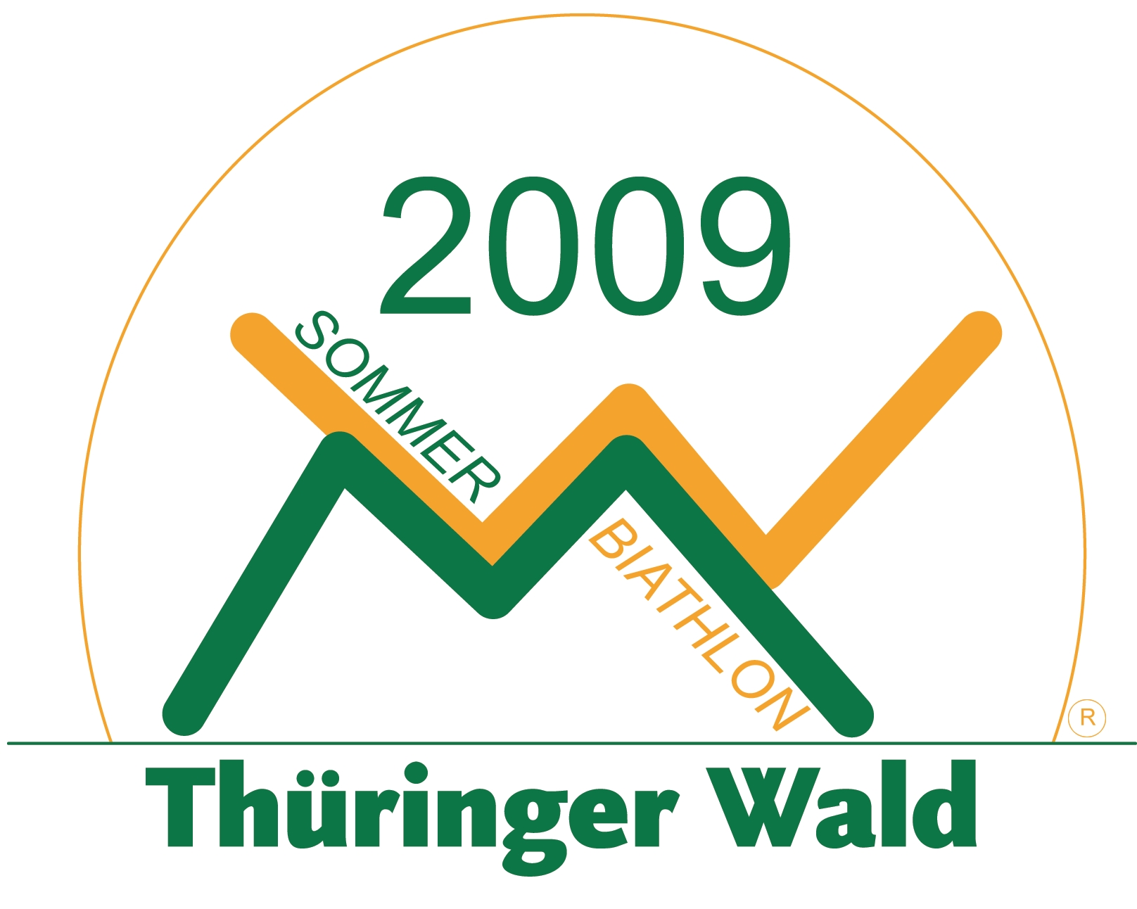 Logo der Sommerbiathlon WM